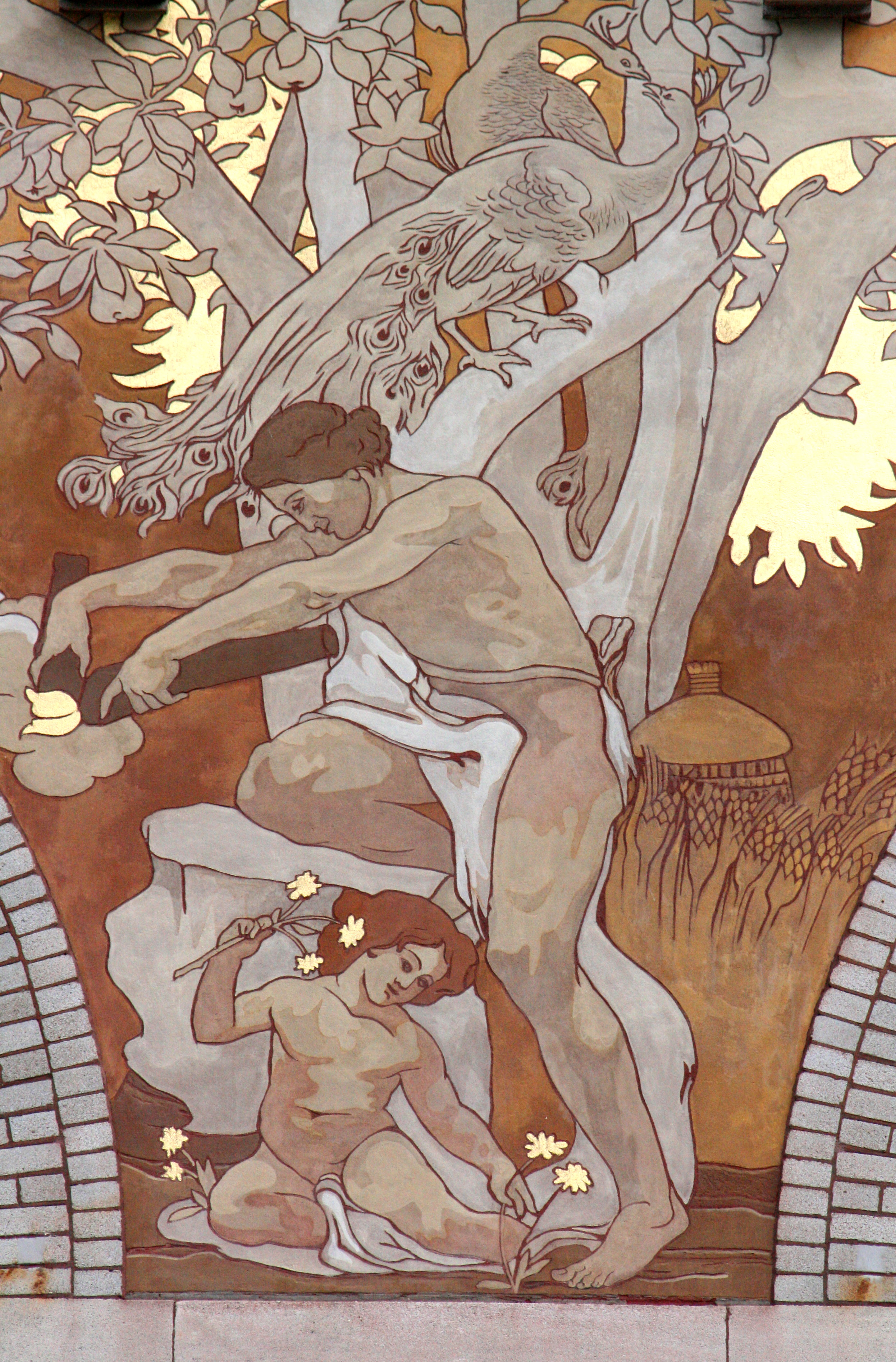 Hôtel Ciamberlani, rue Defacqz 49, Ixelles (Bruxelles), Belgique. Architecte Paul Hankar. Détail: sgraffite